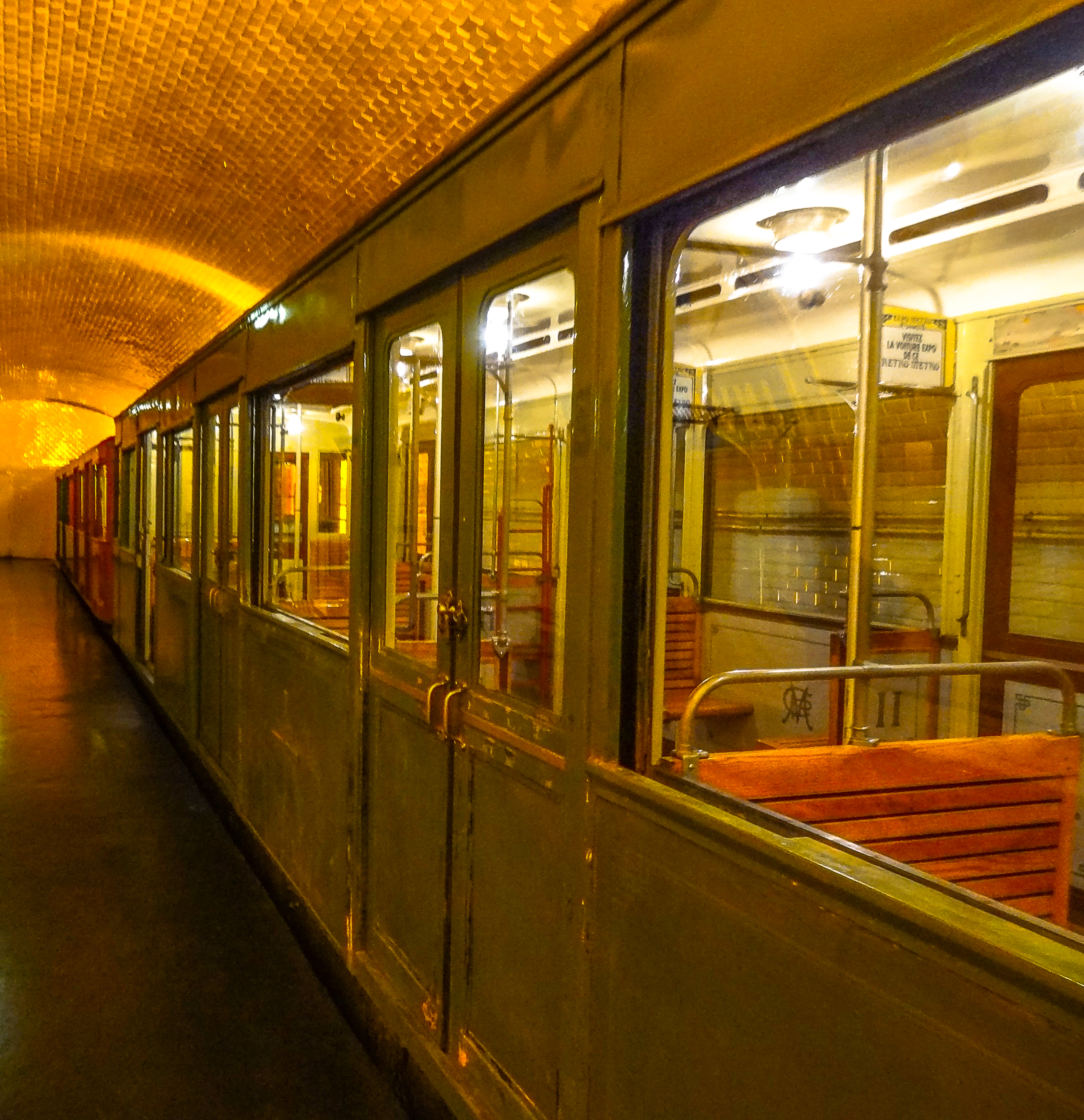 Journées du patrimoine 2012 - Rame Sprague-Thomson.